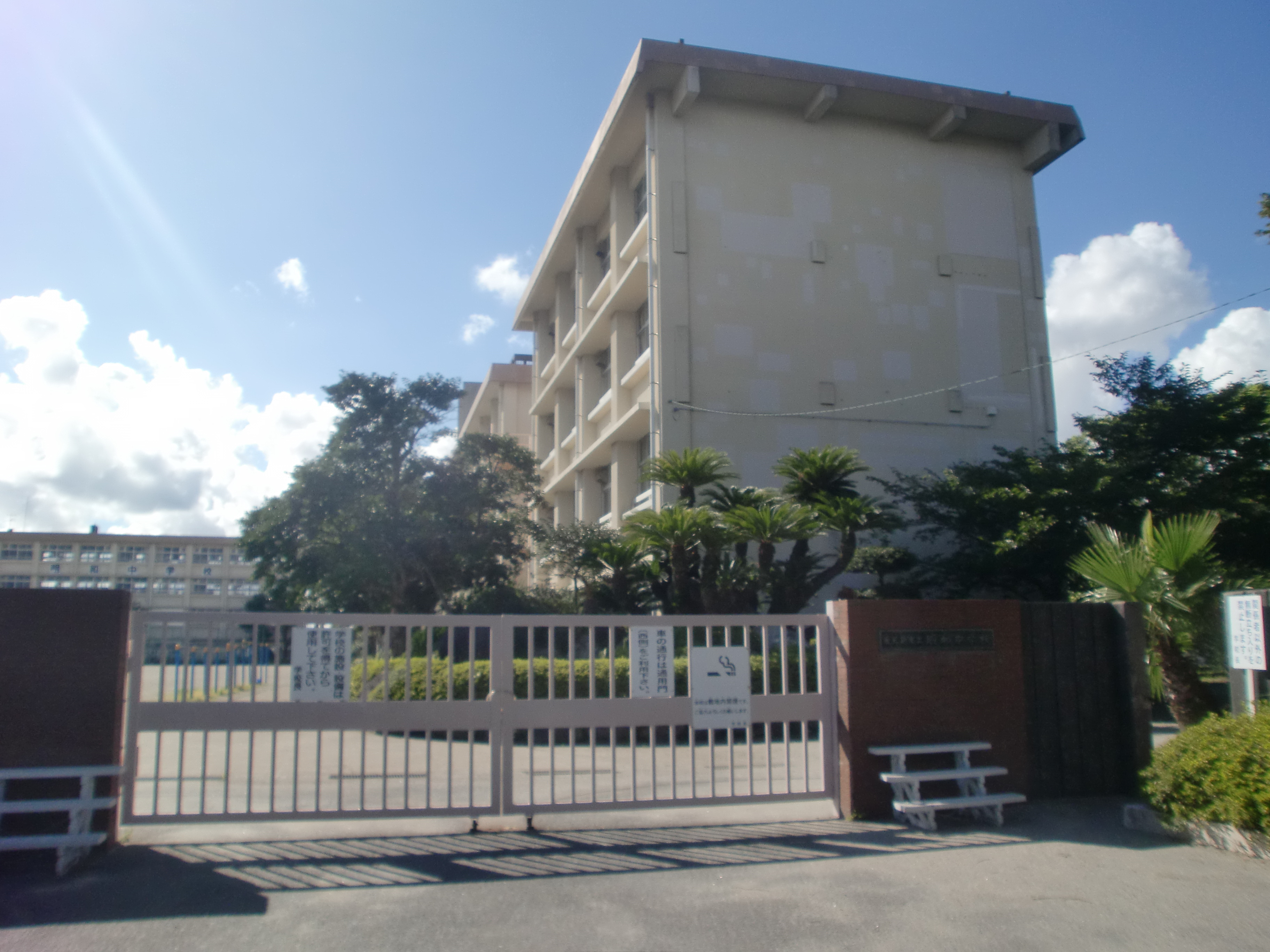 鹿児島市立明和中学校の外観。